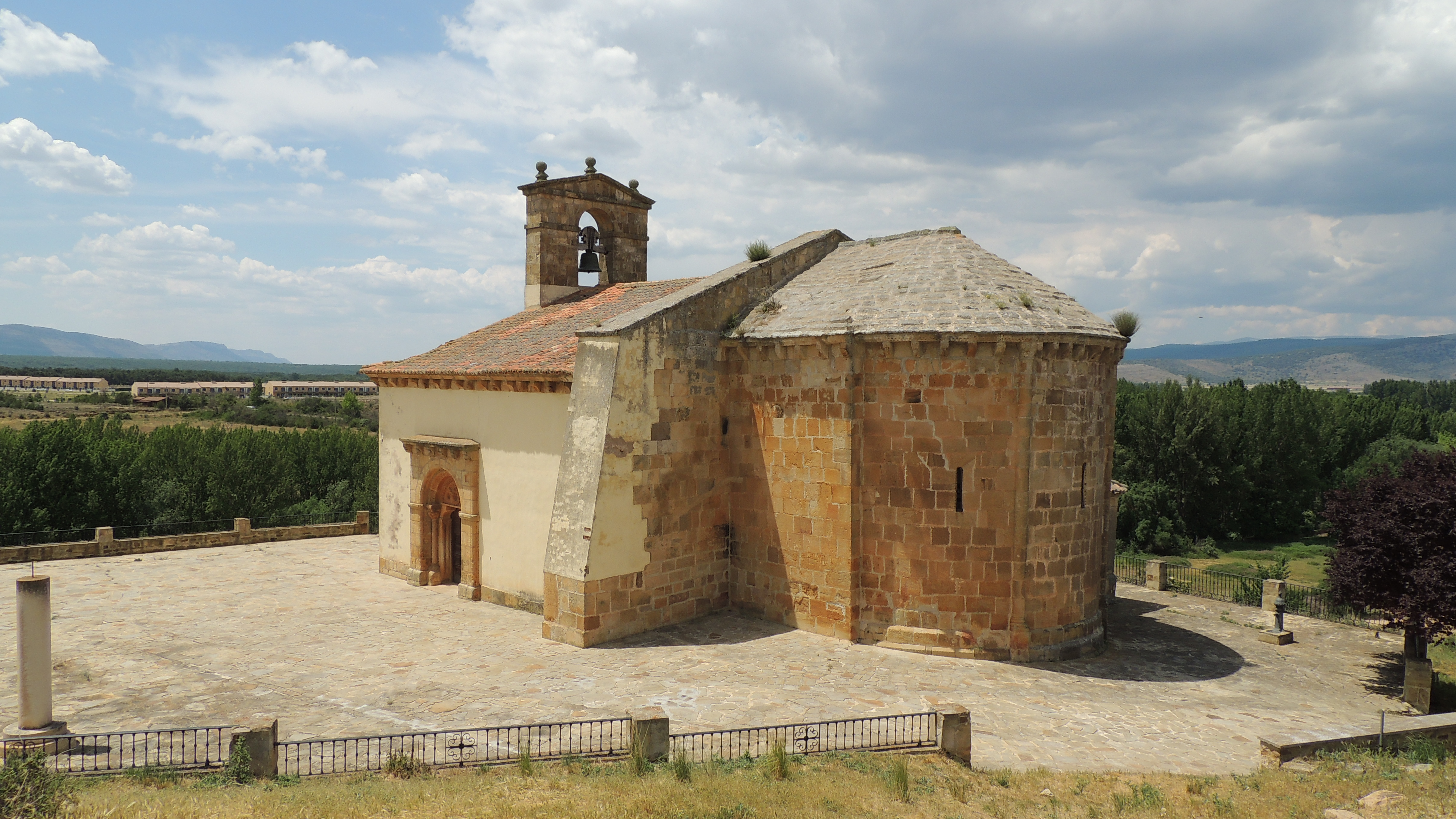 Exterior